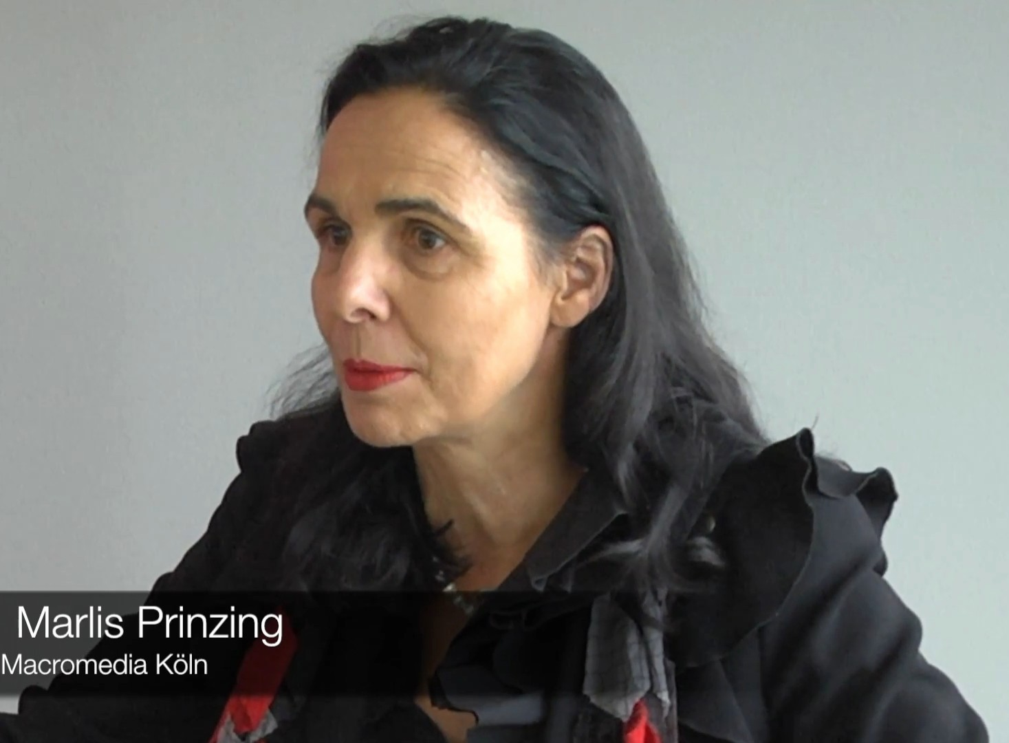 #youchange Welche Kompetenzen vermittelt die Studienrichtung Journalismus (B.A.)? Für welche Berufe qualifizieren sich die Studierenden, welches sind typische Arbeitgeber? Das erläutert Professor Dr. Marlis Prinzing. Sie unterrichtet Journalismus am Campus Köln der Hochschule Macromedia. Weitere Informationen zur Studienrichtung Journalismus (B.A.) finden Sie hier